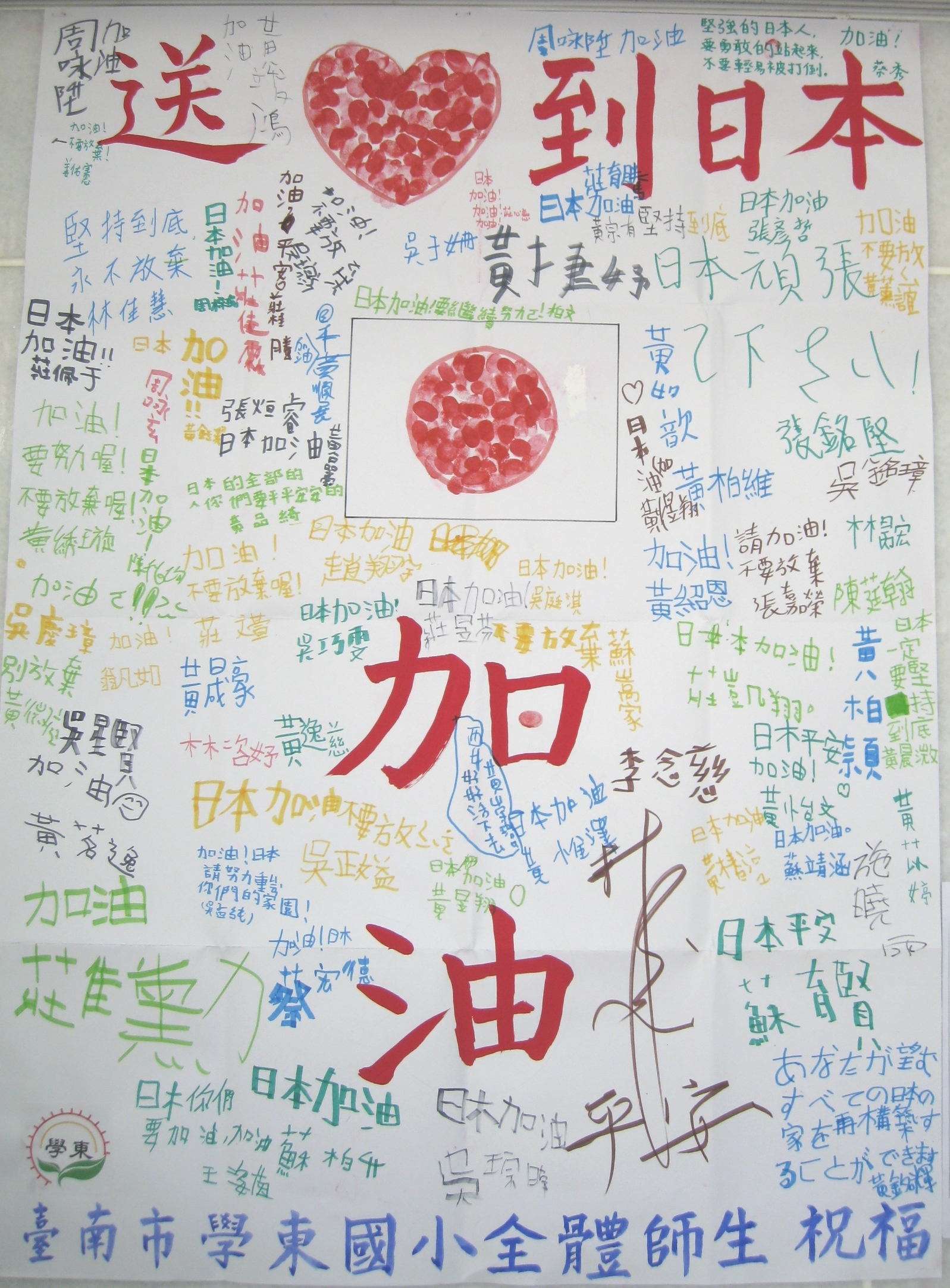 臺灣臺南市安南區學東國民小學全體師生寫給東日本大震災災民的寄語。